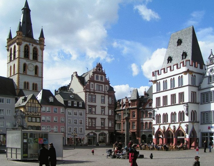 Hauptmarkt Trier mit St. Gangolf, Marktkreuz und Steipe (v.l.n.r), Germany